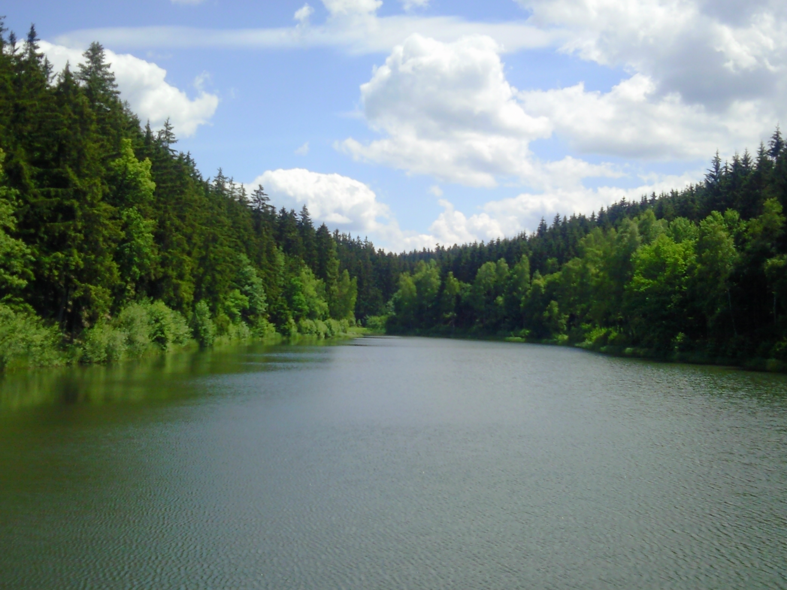 Fürstenteich - Blick vom Damm in Richtung Stauwurzel